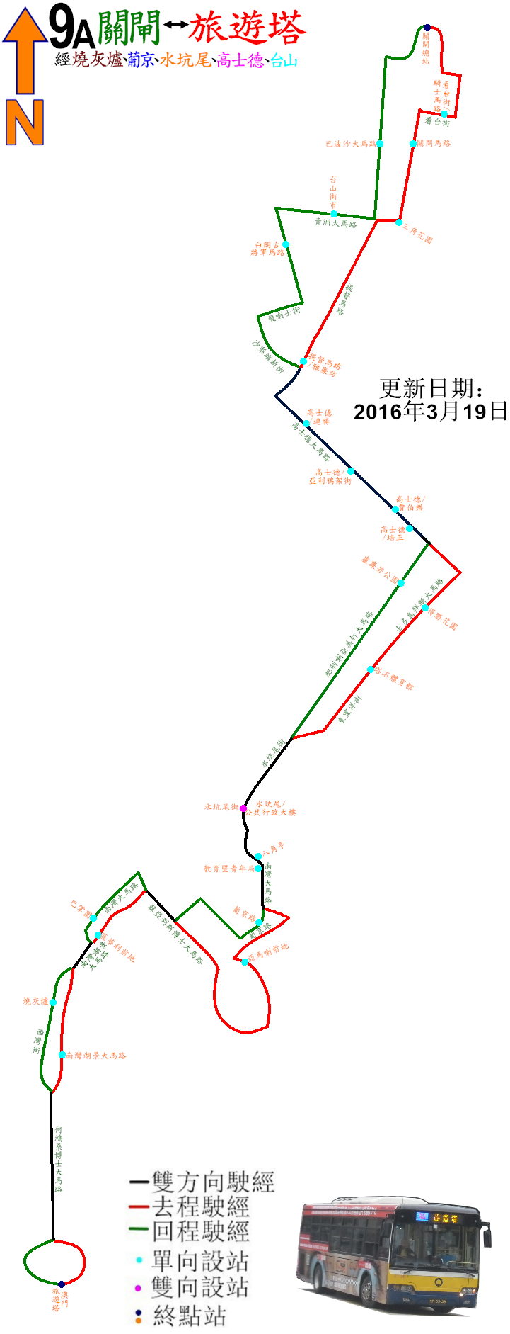 中文（香港）: 澳門巴士9A線的走線圖